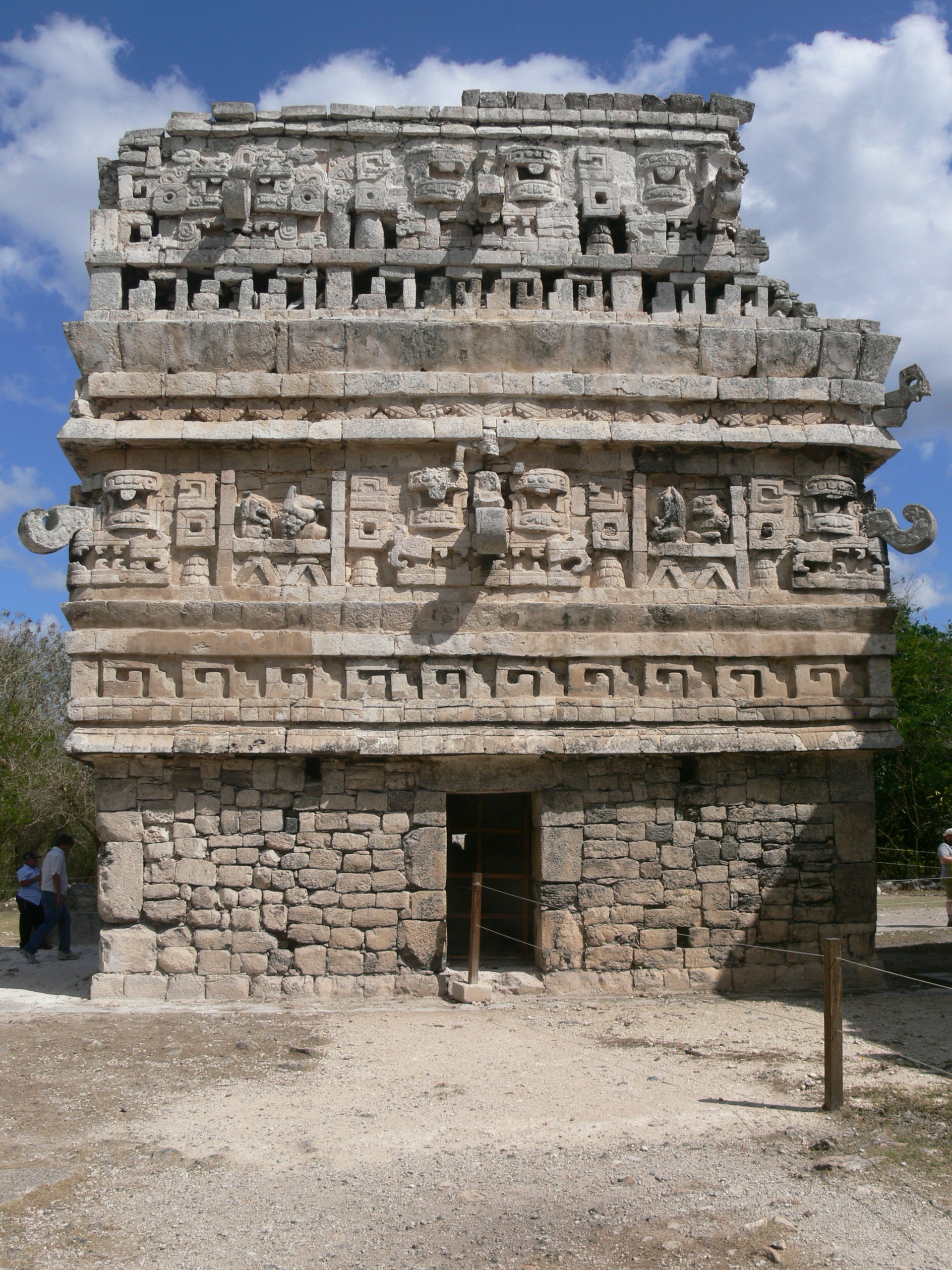 Chichen Itza. Temple "La Iglesia"